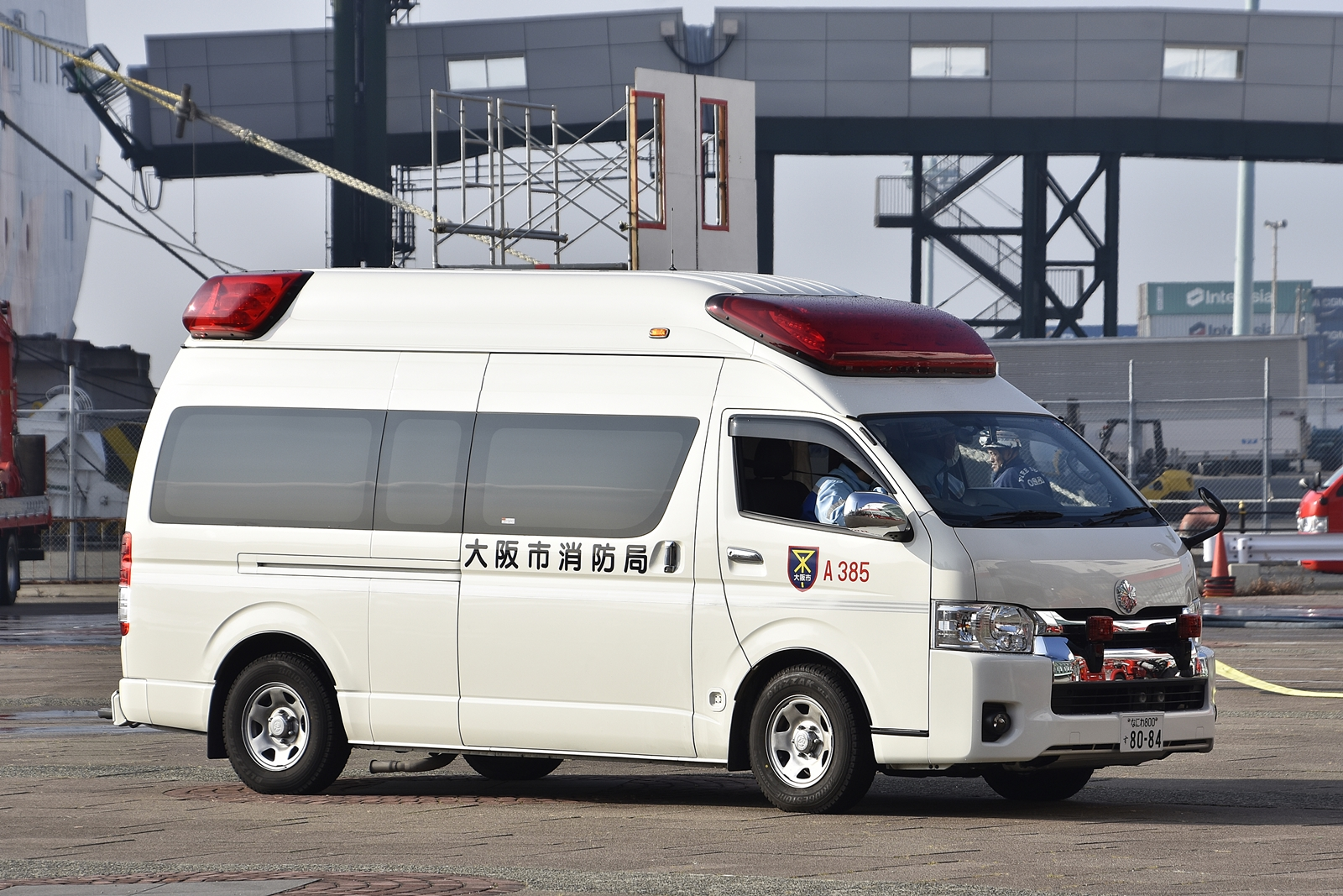 大阪市消防局浪速消防署恵美須出張所救急車A385、トヨタ3代目ハイメディック4型